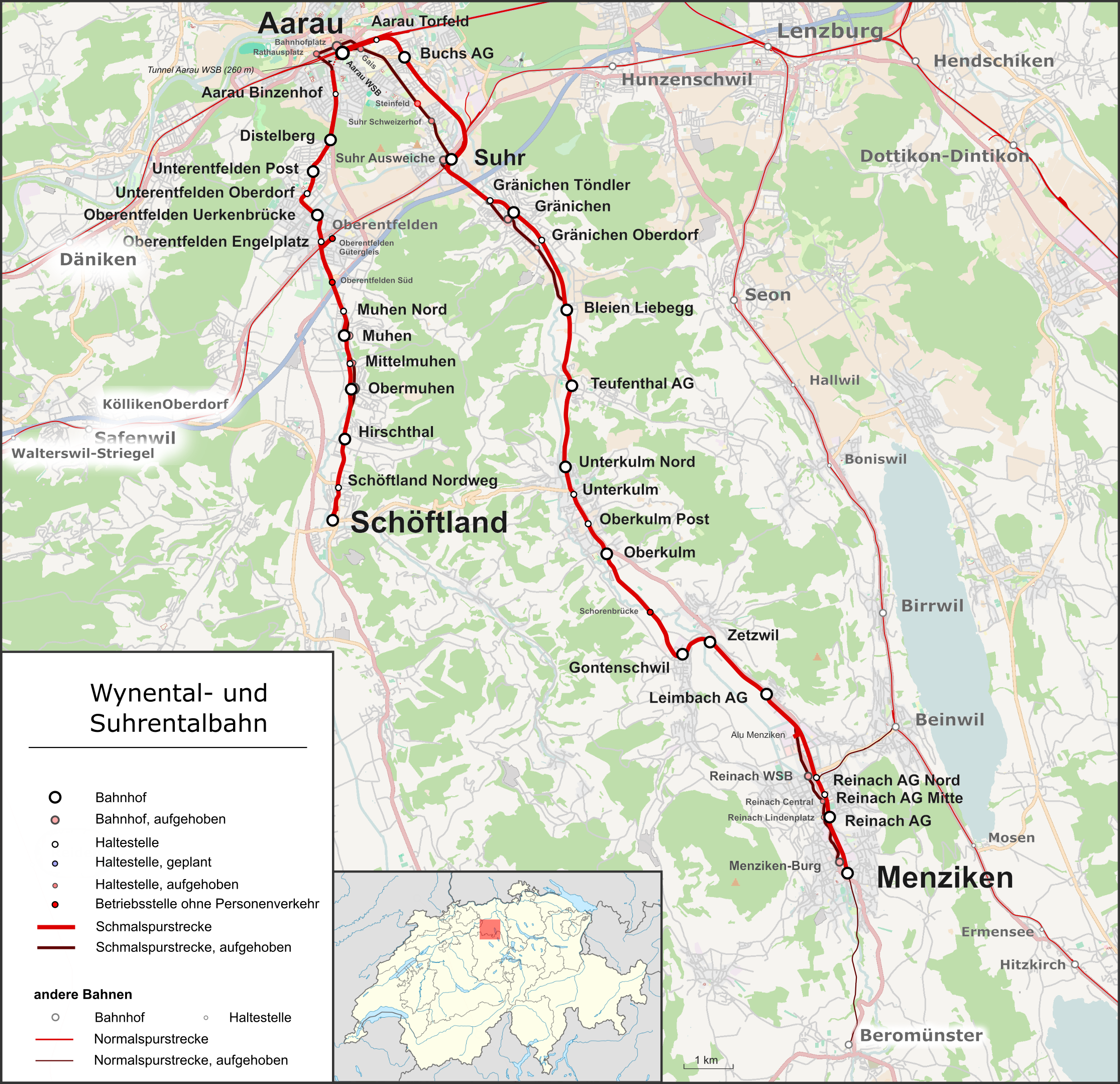 Karte der Wynental- und Suhrentalbahn in der Schweiz